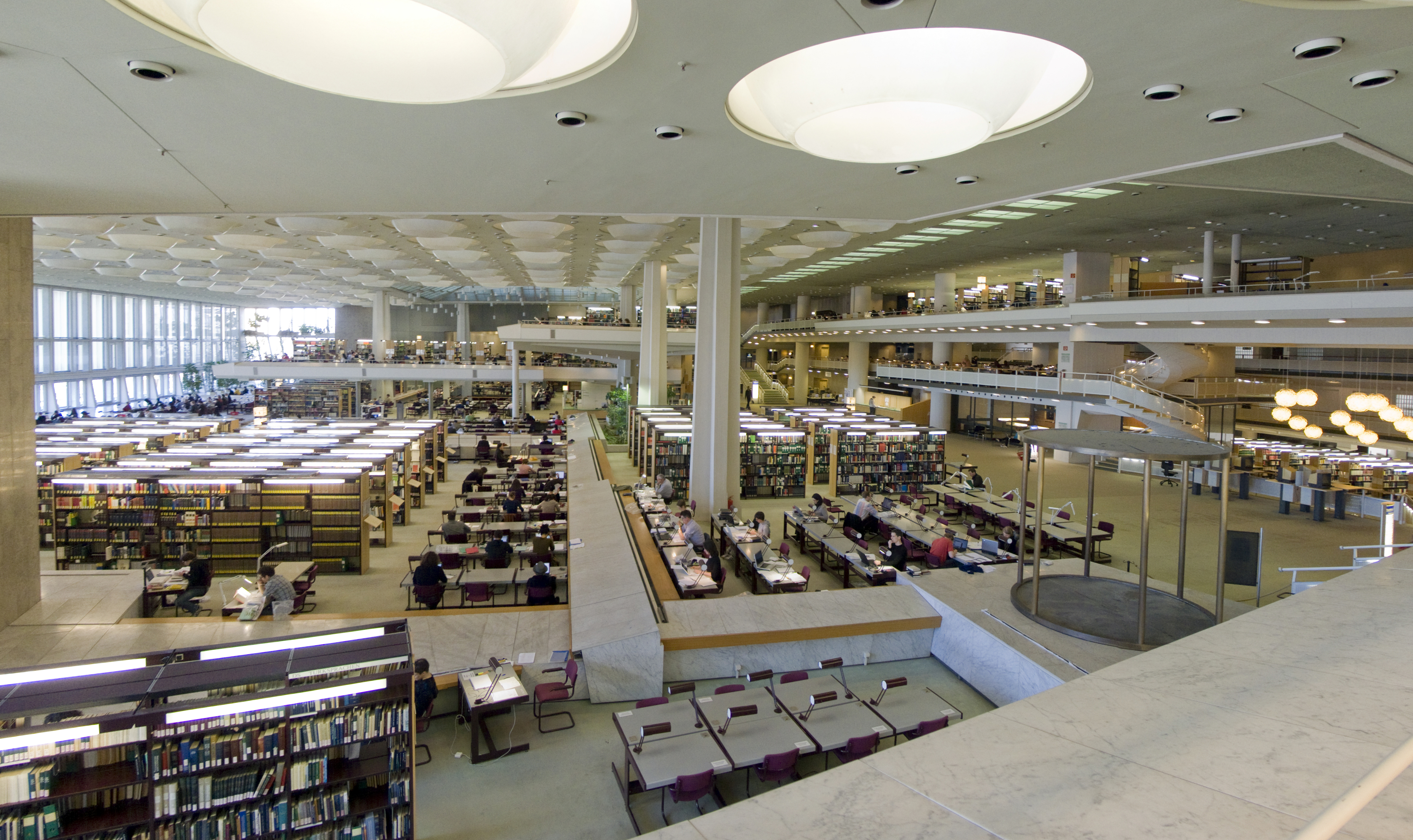 Staatsbibliothek Berlin, Haus Potsdamer Straße, Lesesaal, Hans Scharoun, Edgar Wisniewski, Berlin-Tiergarten, Aufnahme März 2011